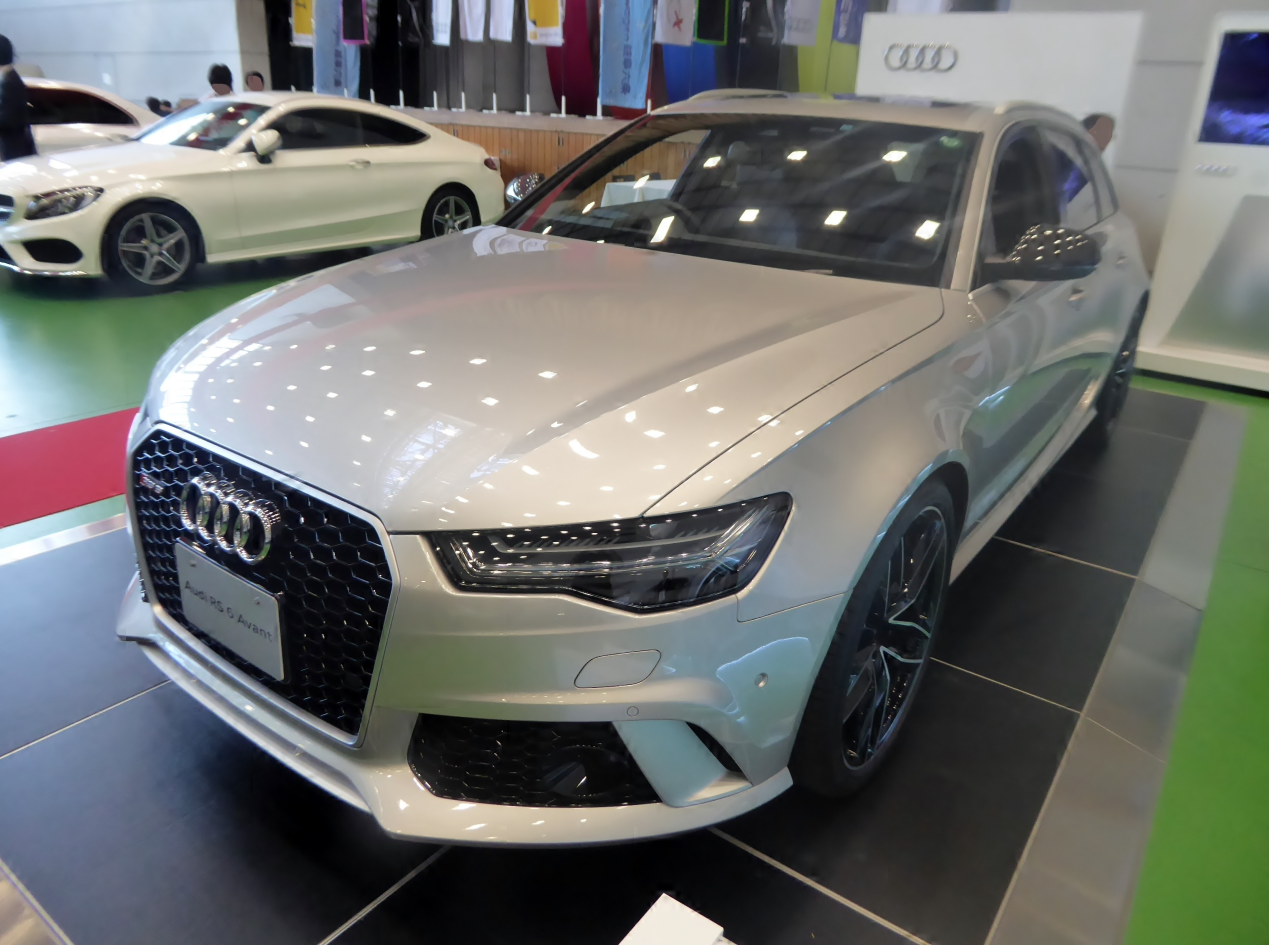 C7系アウディ・RS6アバントパフォーマンスをフロントから撮影。